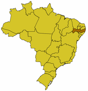 Karte Brasiliens, Pernambuco hervorgehoben, GFDL nach der Vorlage Bild:Brasilien Bundesstaaten.png